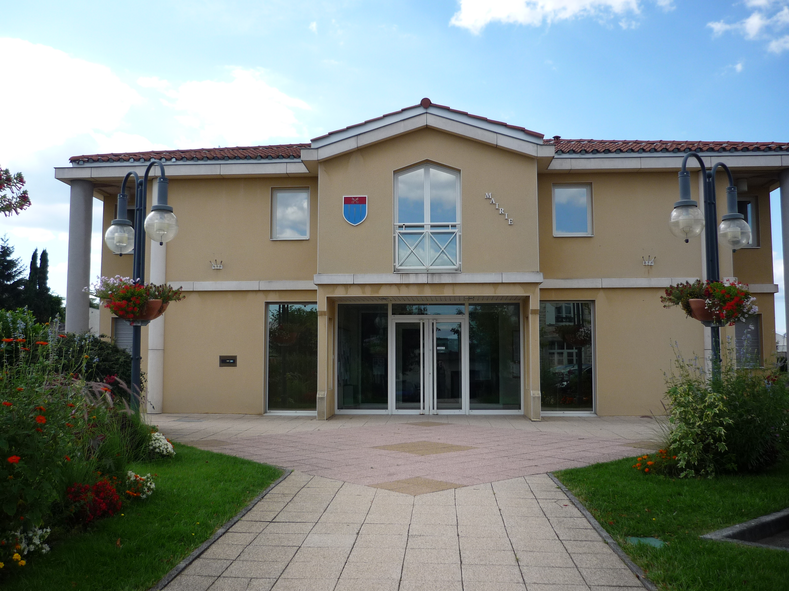 Mairie de Dommartin, dans le département du Rhône